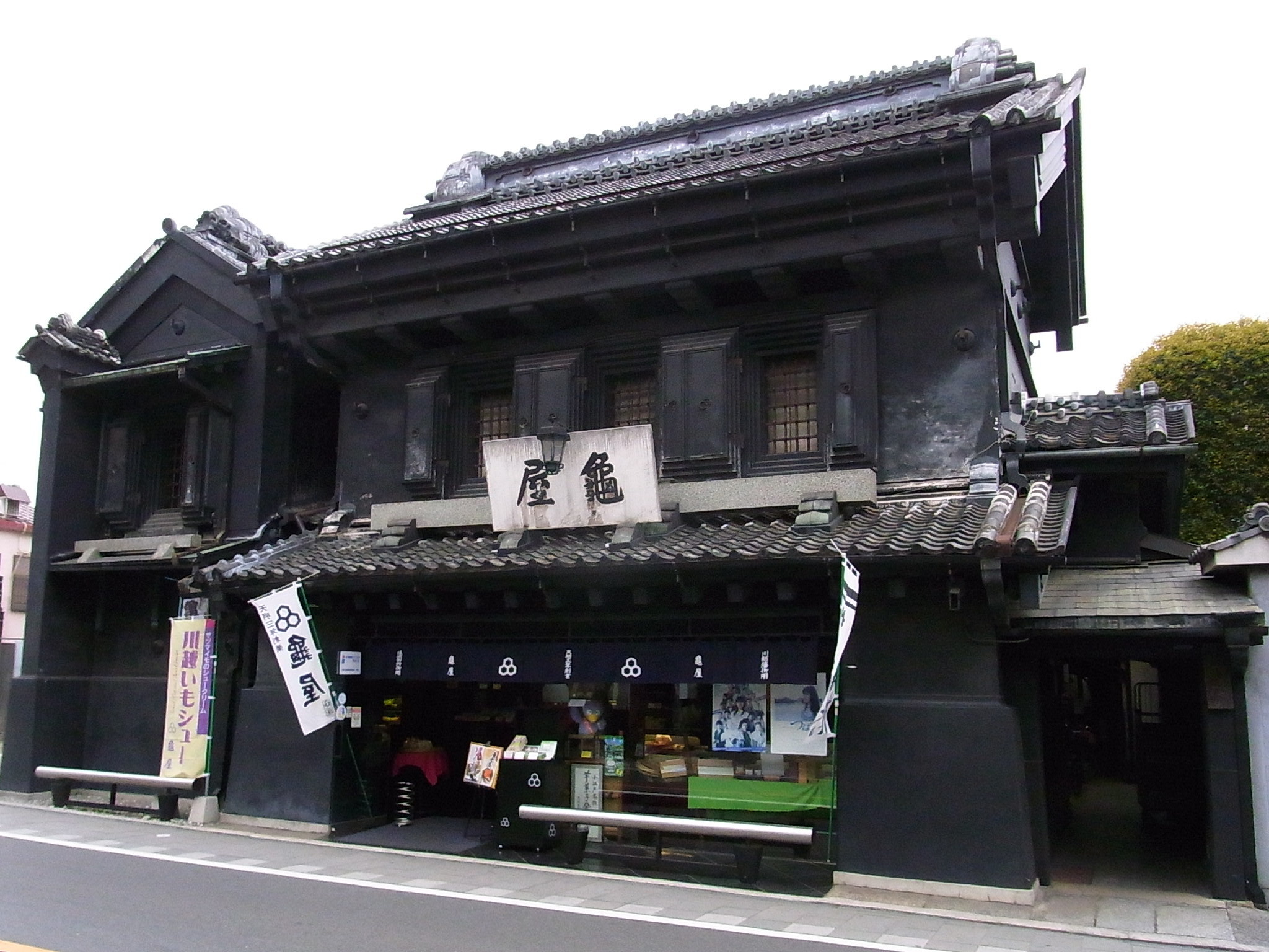 川越 亀屋